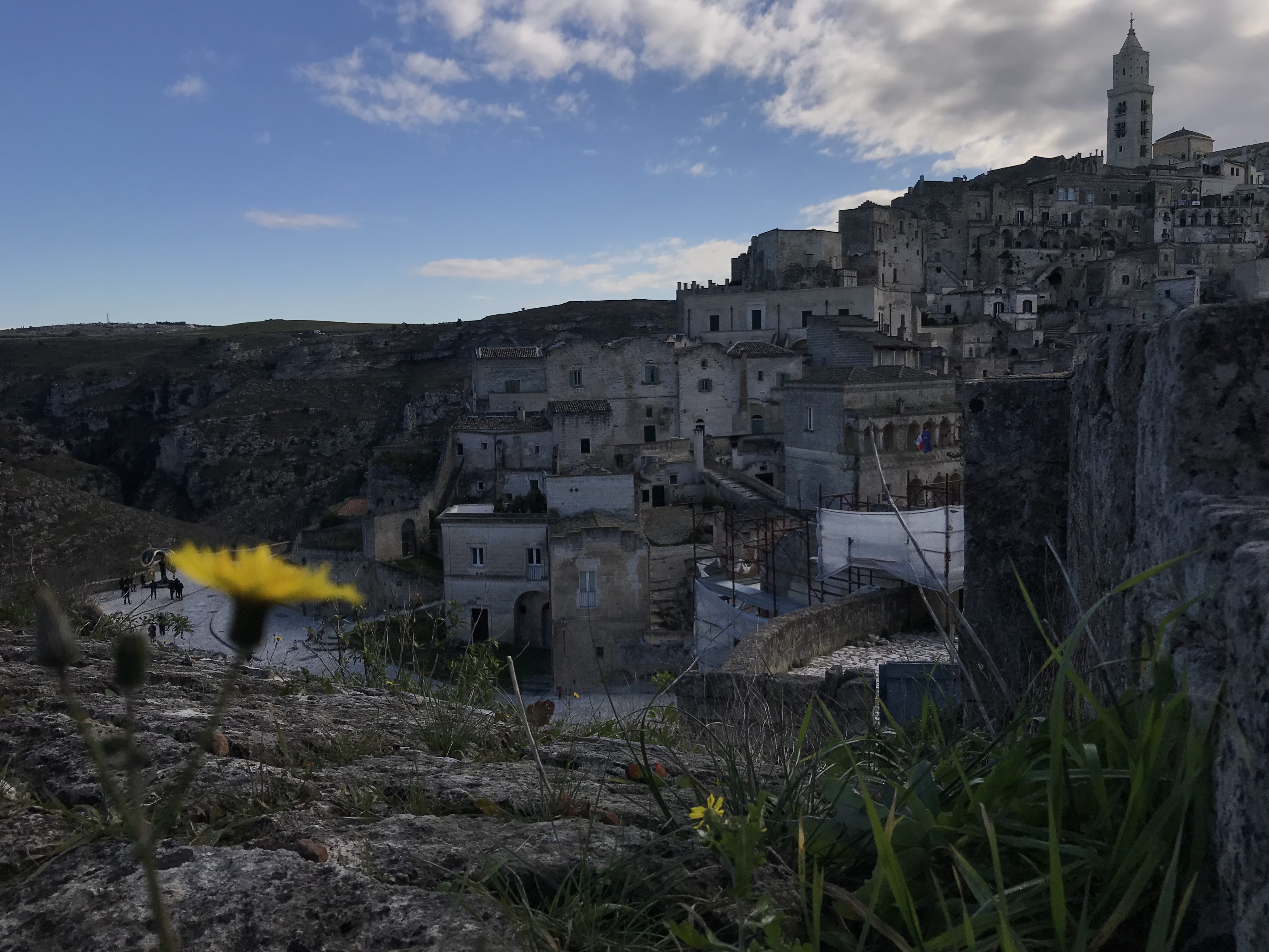 Gravine di Matera (Q55423279)